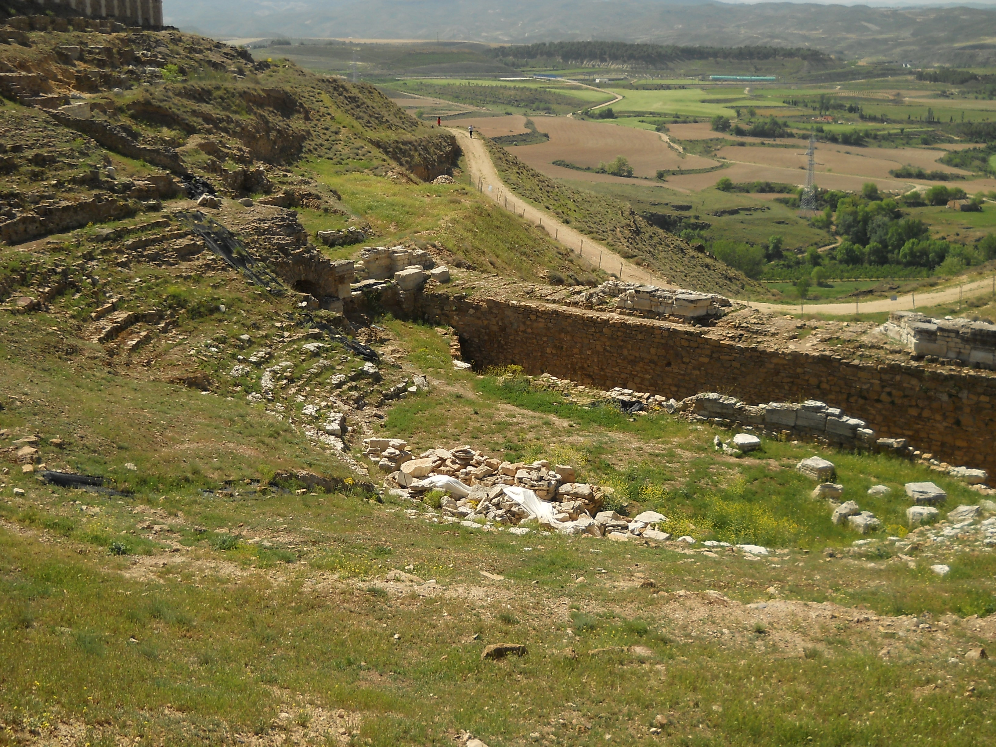 Teatro romano, antigua Bílbilis, Calatayud, Zaragoza, España